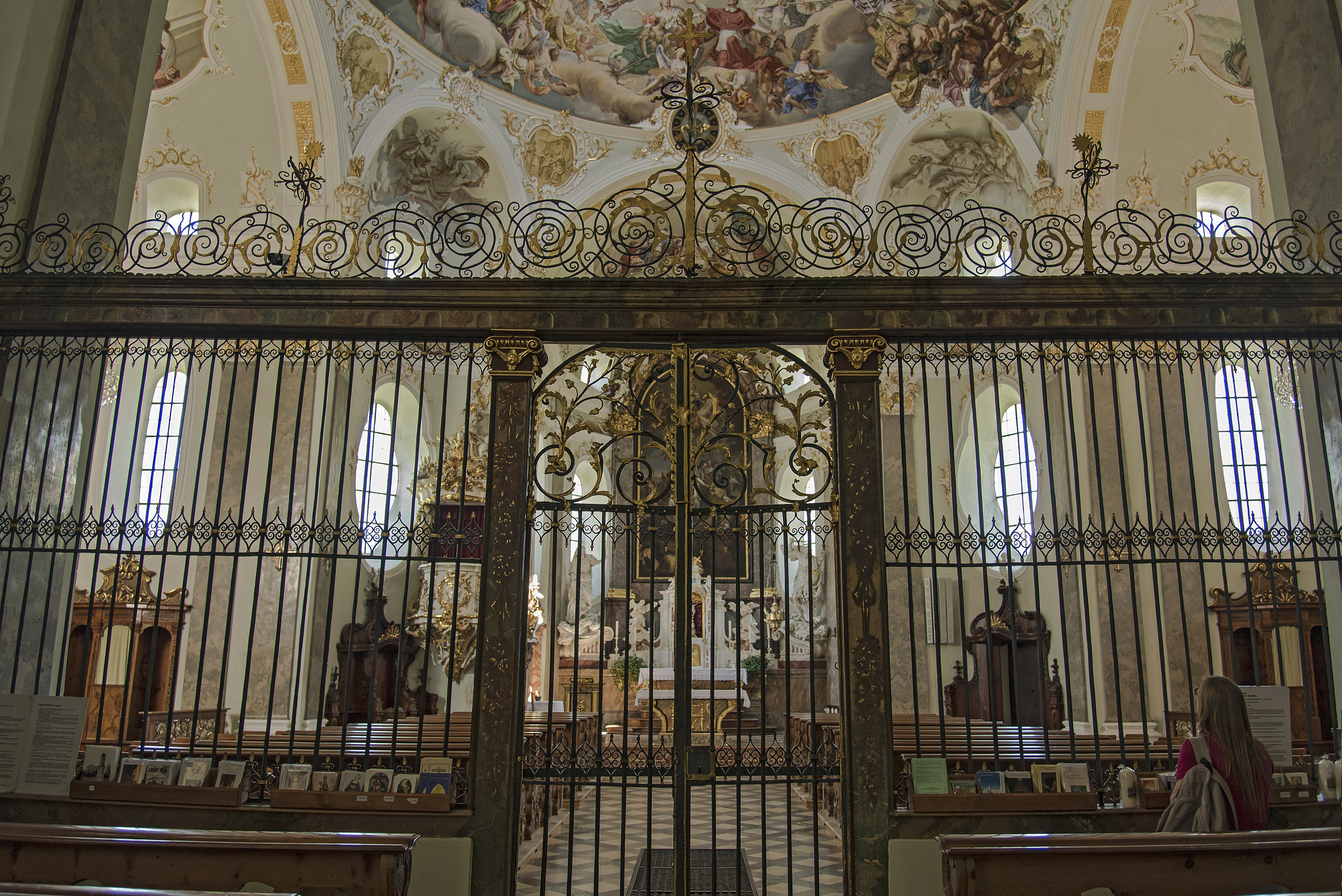 Stiftskirche hl. Karl Borromäus. Das Eisengitter aus dem Jahr 1682 stammt von Oswald Kayser aus Hall i. Tirol.